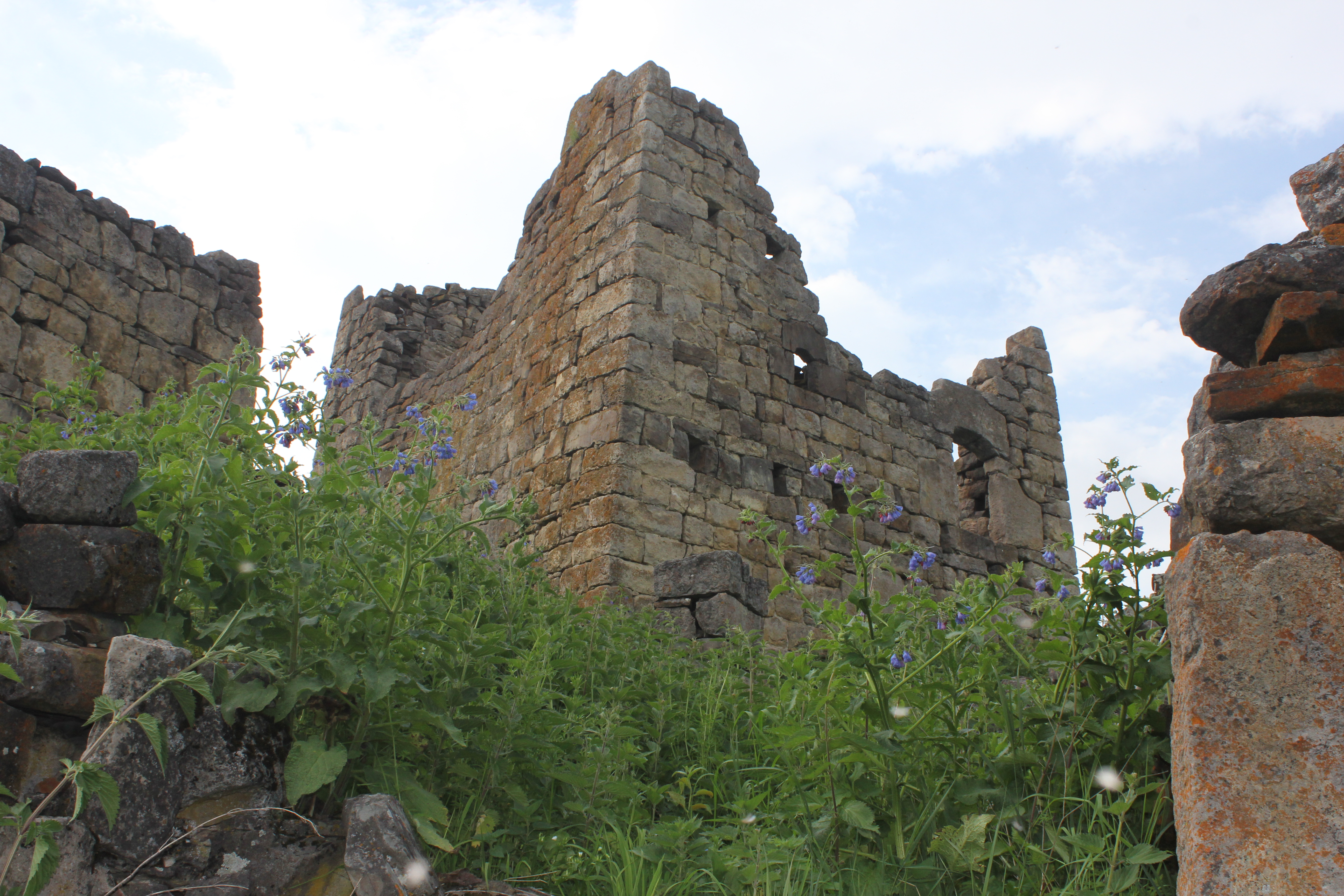 Жилая башня в селении Т1ийста